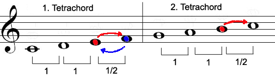 Leittoene der Dur-Tonleiter